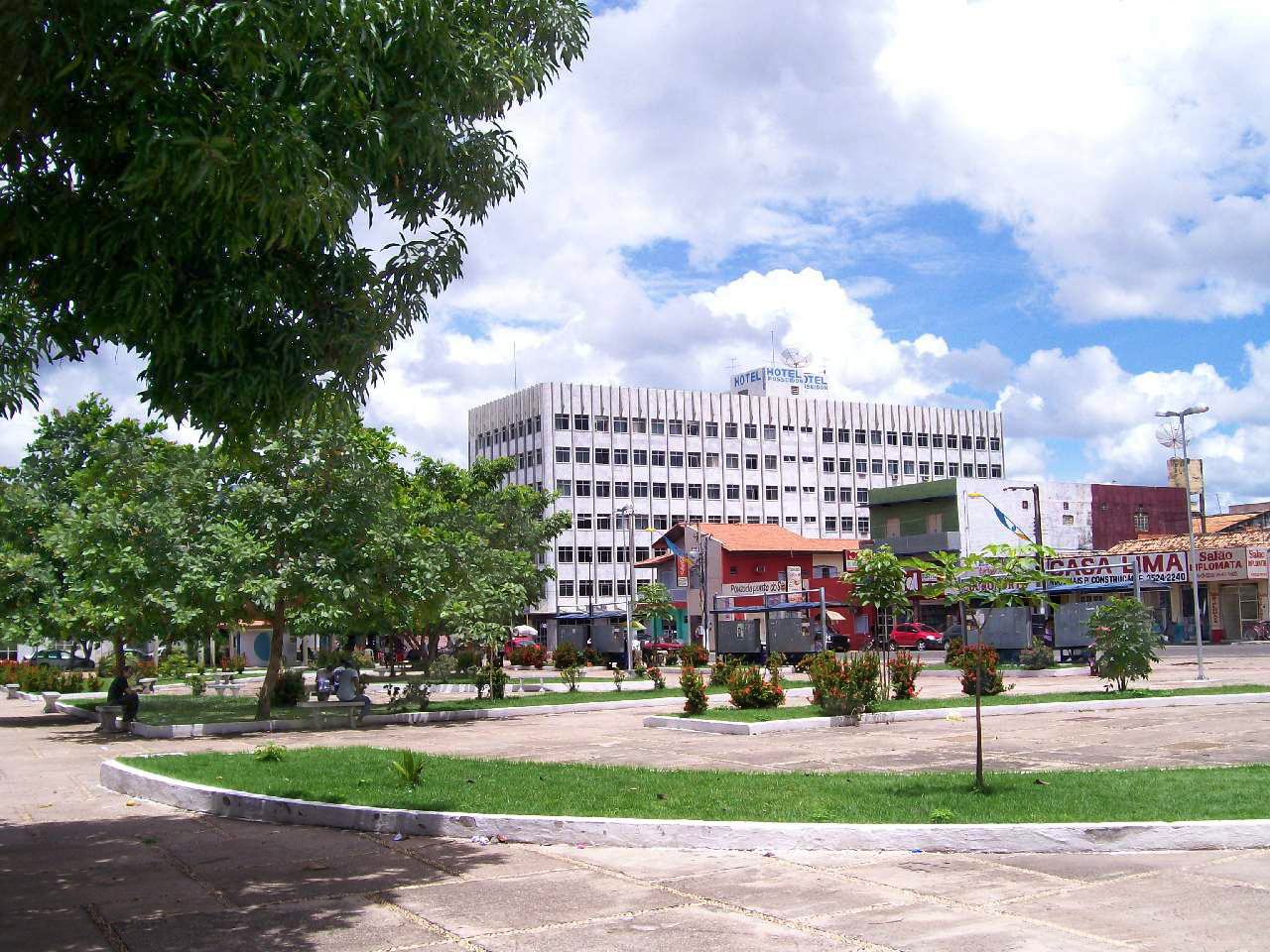 Praça Brasil. Imperatriz Maranhão.